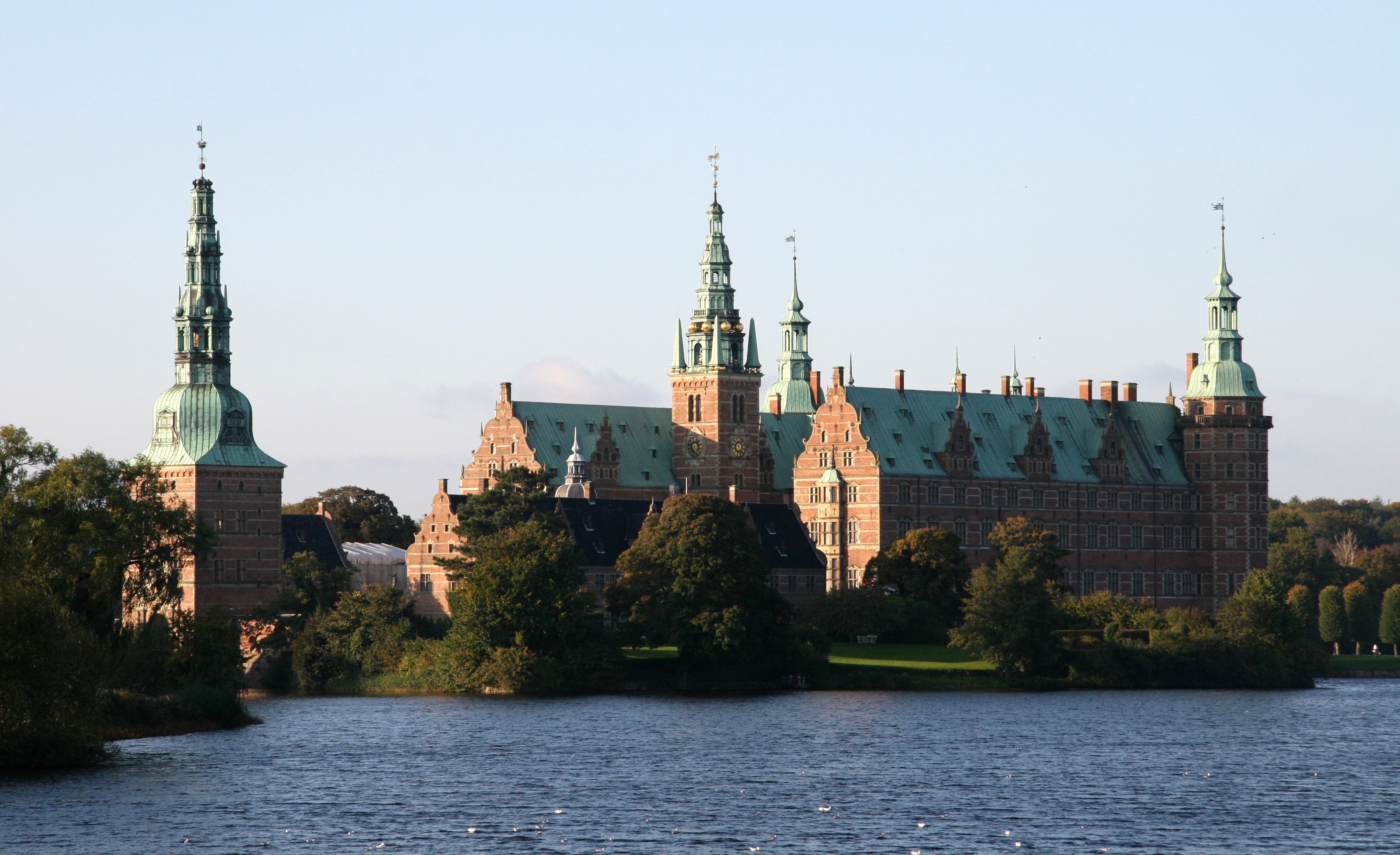 Frederiksborg Slot, Hillerød, Denmark. View from Hillerød town square.